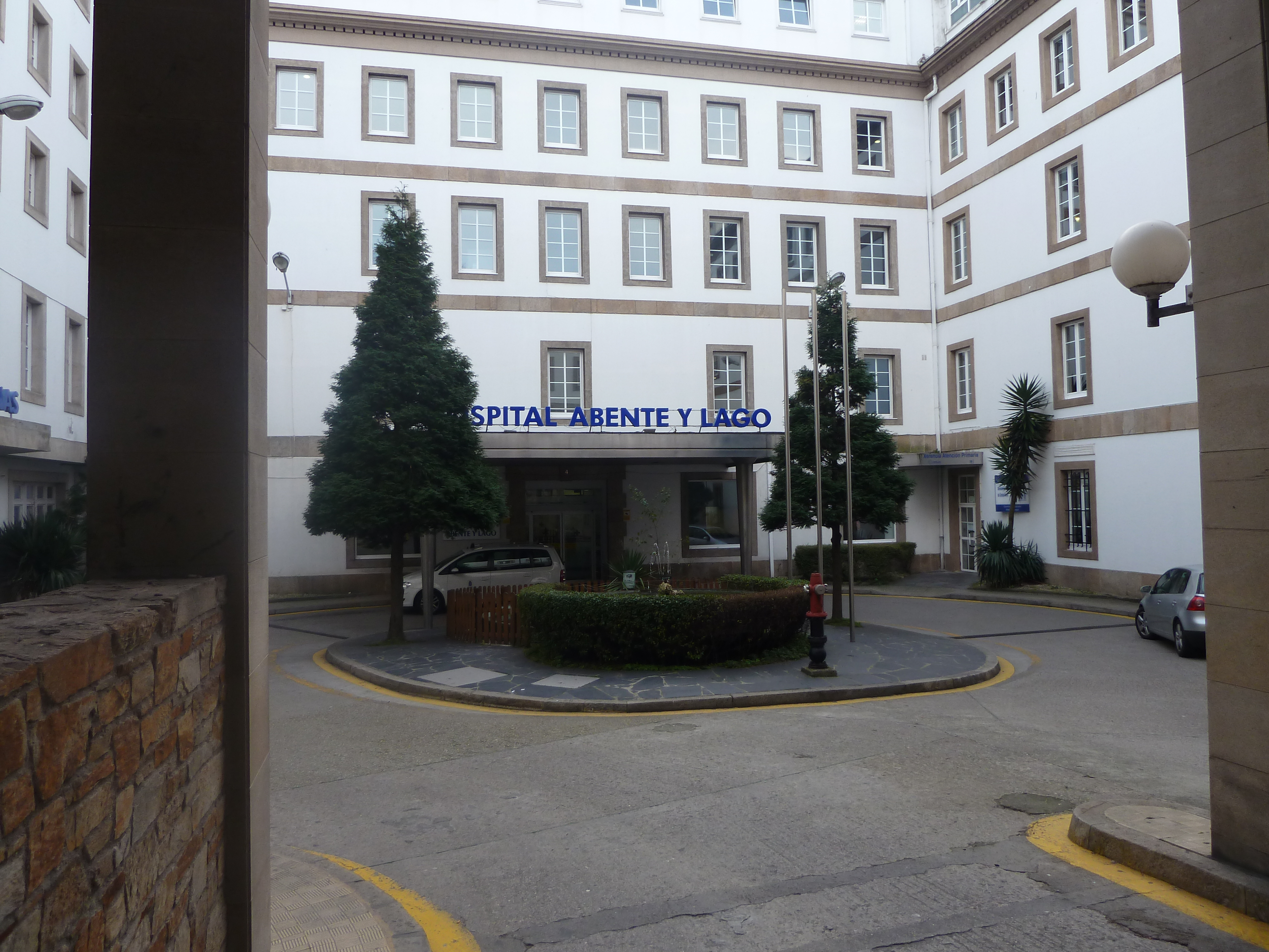 Entrada do Hospital Abente e Lago da Coruña.